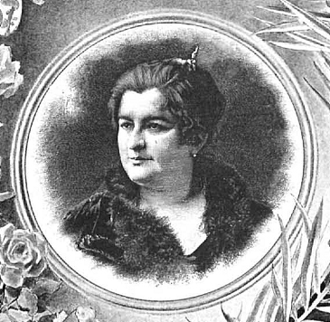 Retrato de Emilia Pardo Bazán, publicado en la revista española La Ilustración Artística.